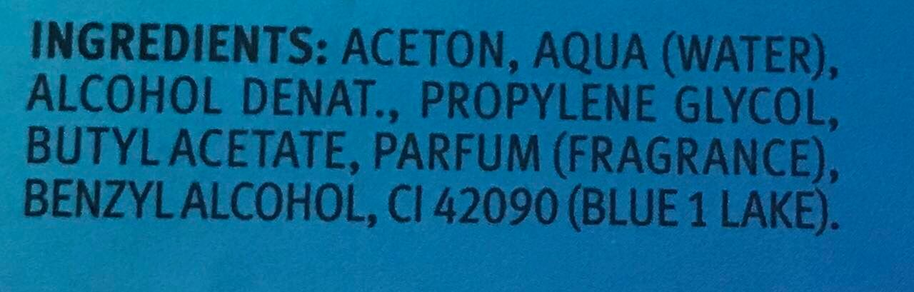 Inhaltstoffe eines acetonhaltigen Nagellackentferners